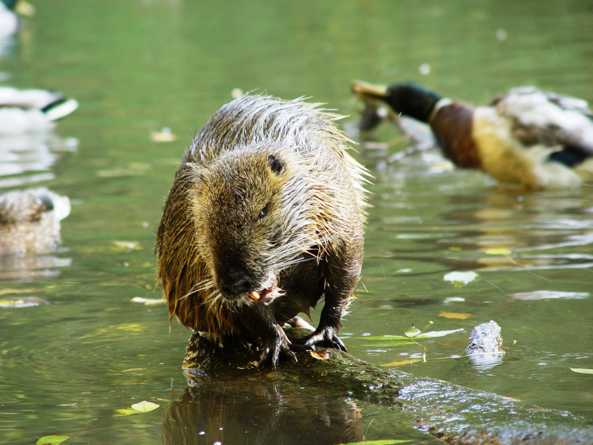 Nutria (Myocastor coypus) an der Saale bei Halle